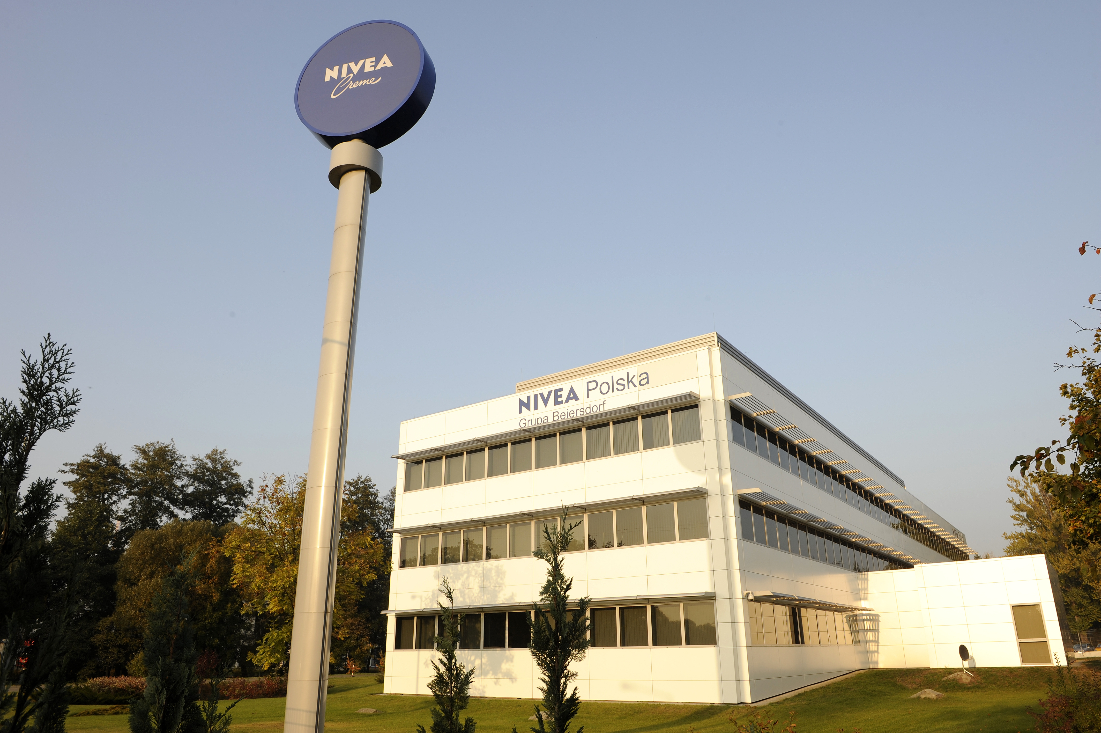 Siedziba NIVEA Polska Sp.z o.o., Poznań